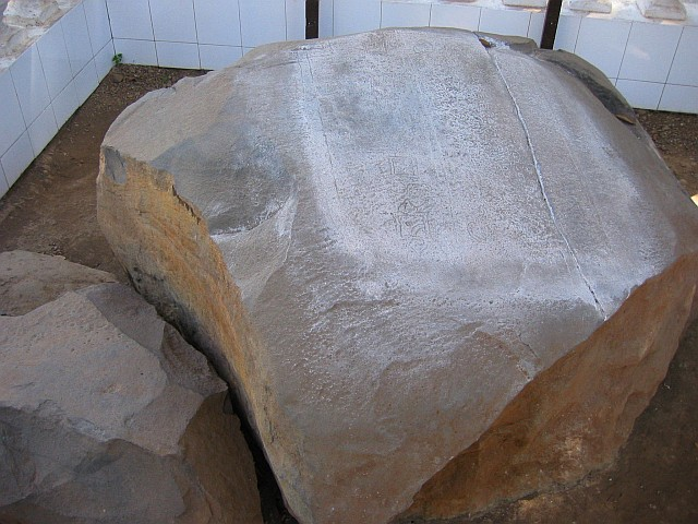 Prasasti Plumpungan di Salatiga, Jawa Tengah, Indonesia.